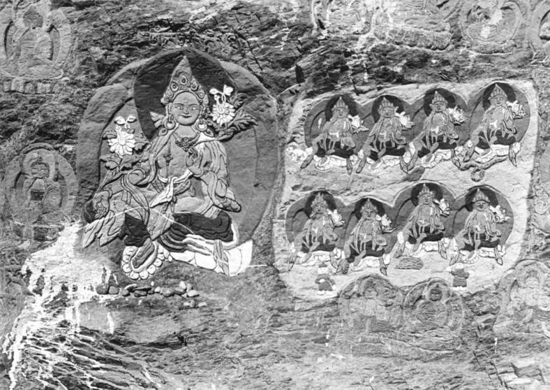 Lhasa, Medizinburg, Steinmalereien